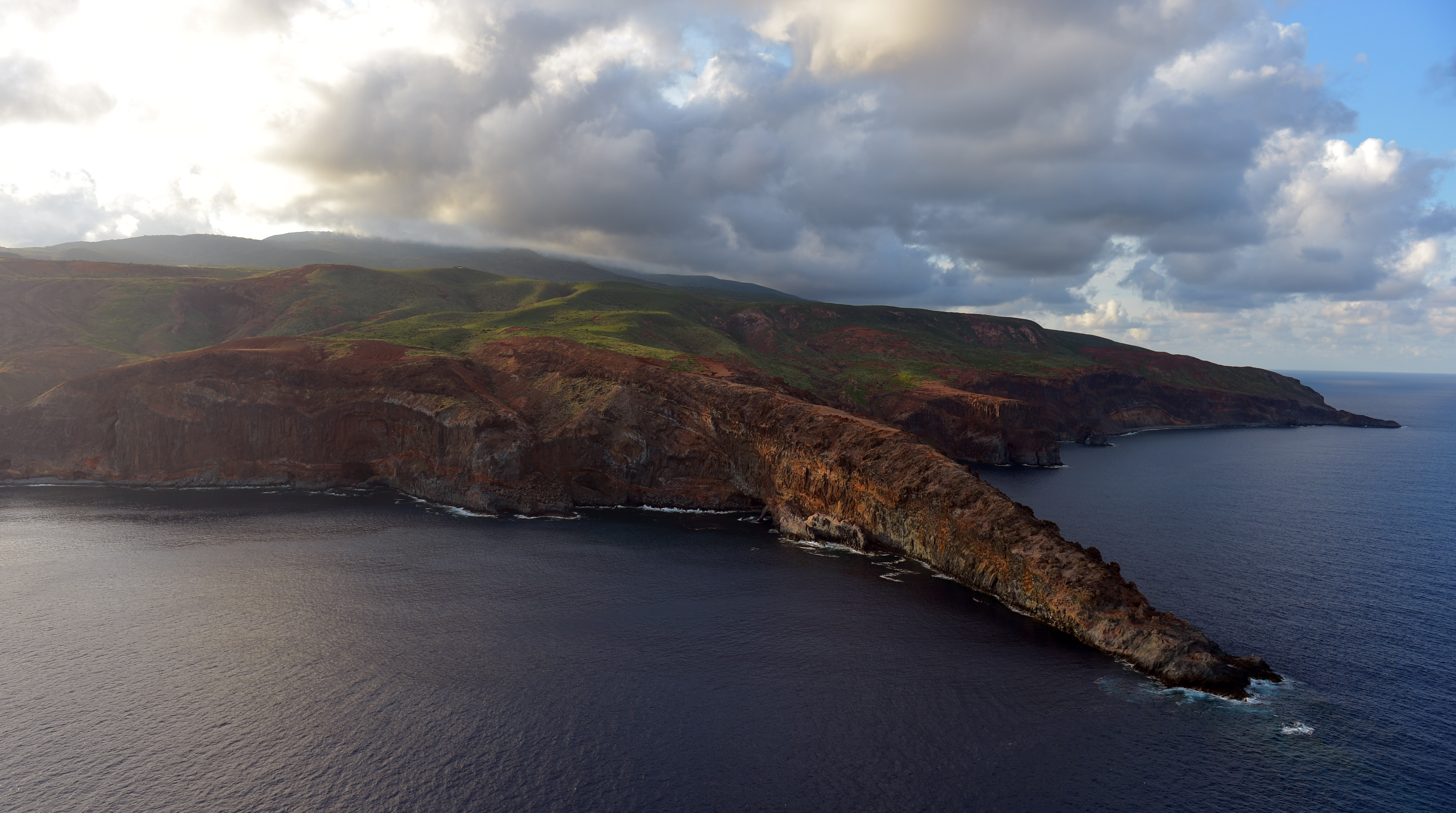 Declaratoria Oficial de Patrimonio Mundial de la Humanidad del Archipiélago de las Islas Revillagigedo